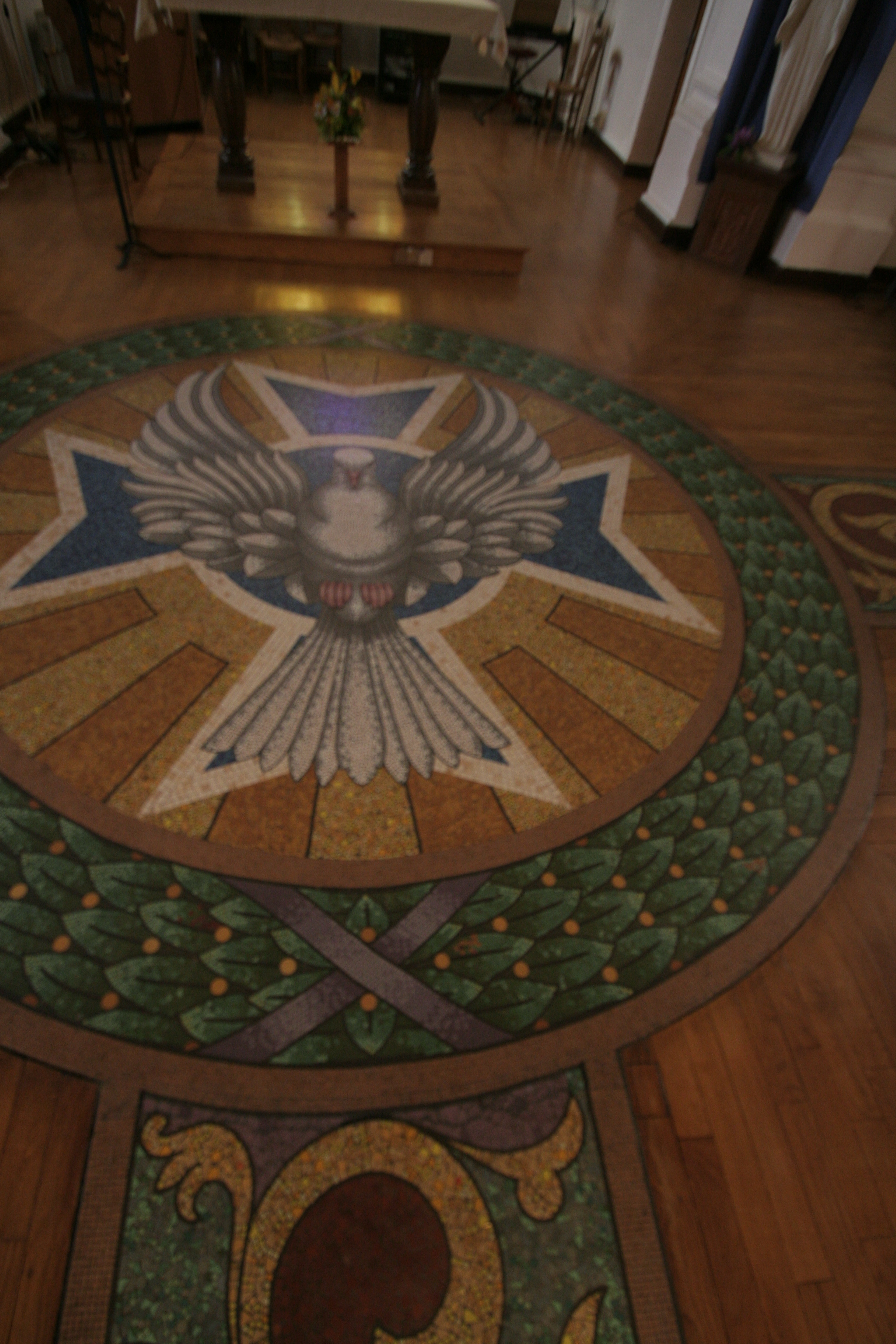 Photographie de l'intérieur de la chapelle édifiée rue Pierre-Marchand sur les plans de l'architecte Armand Frigault. Les vitraux intitulés "Notre-Dame de Pontmain et Sainte-Thérèse" et "Saint-Armel" sont l'œuvre des maîtres-verriers Maunejean Frères. La mosaïque représentant la Colombe du Saint-Esprit est l'œuvre de l'atelier Isidore Odorico